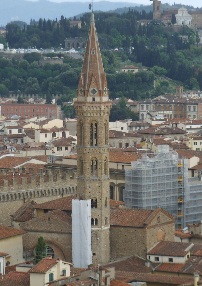 Badia fiorentina view